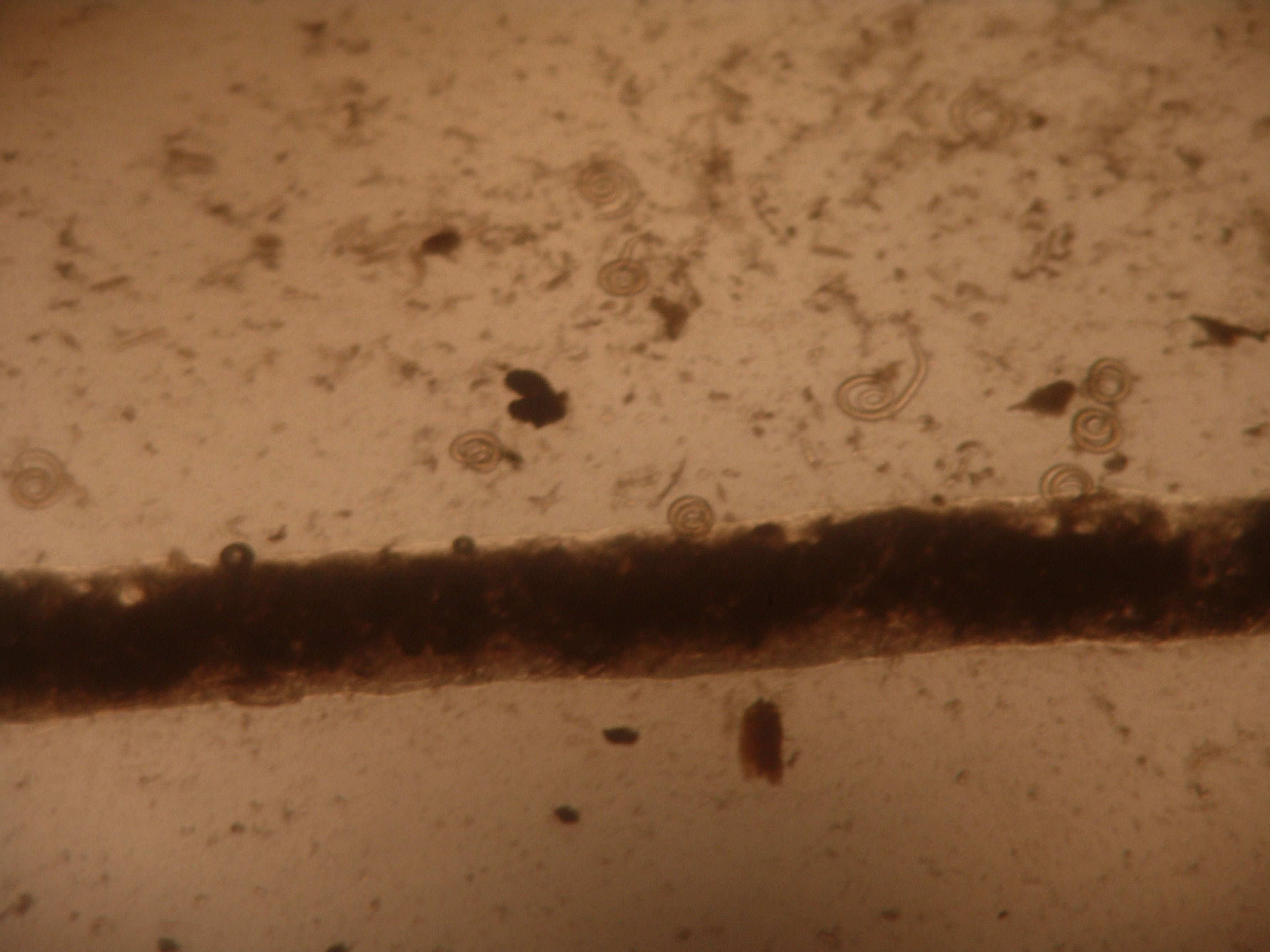 Trichinella Spiralis observada en triquinoscopios, después de la digestión artificial. La muestra pertenece a carne de jabalí. La imagen fue tomada por un veterinario habilitado en una sala de tratamiento de caza, en la provincia de Jaén. La carne procede de un jabalí abatido en una montería.